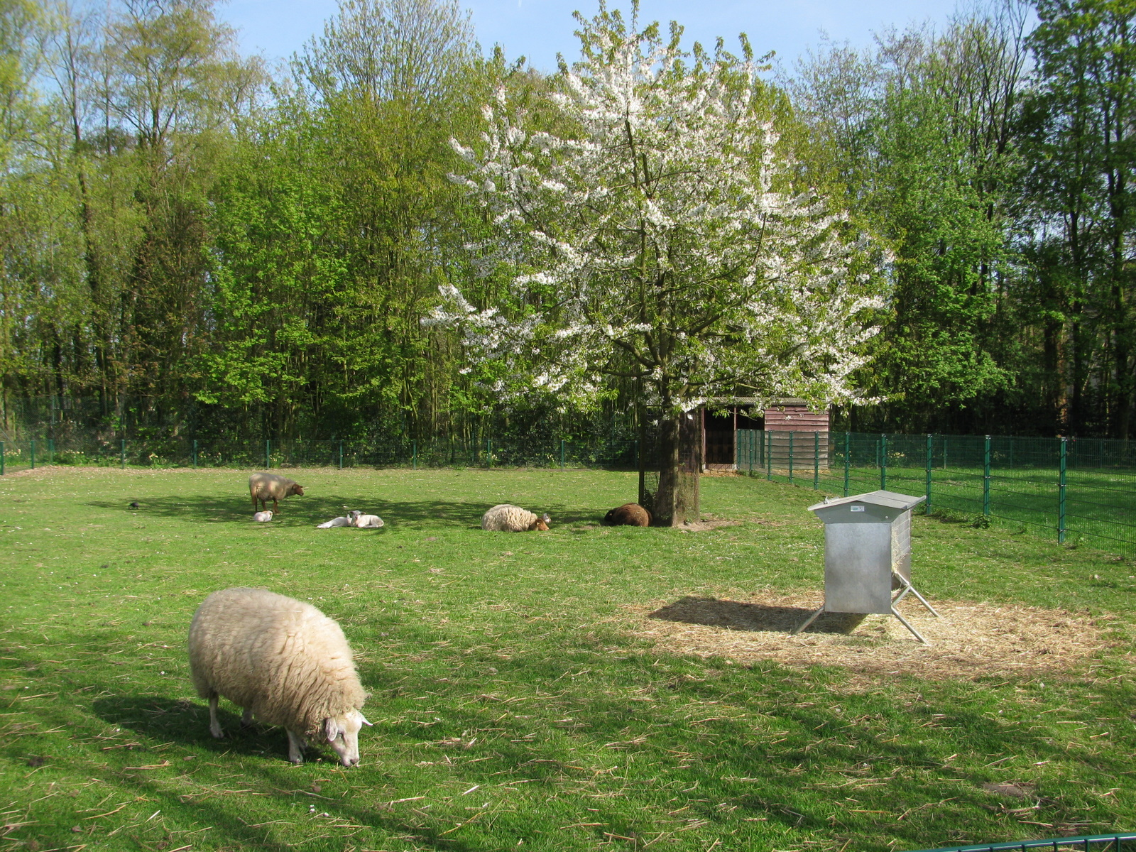 Kinderboerderij Drongen